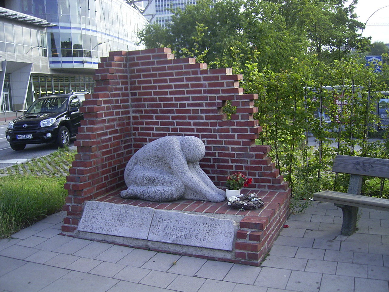 Das Mahnmal für die Opfer des Feuersturms wurde 1985 von Hildegard Huza geschaffen und steht zwischen Hamburger Straße und Oberaltenallee in Barmbek-Süd. Buchenhecke als Hintergrund. Die Buchenhecke wurde in den darauffolgenden Jahren entfernt.